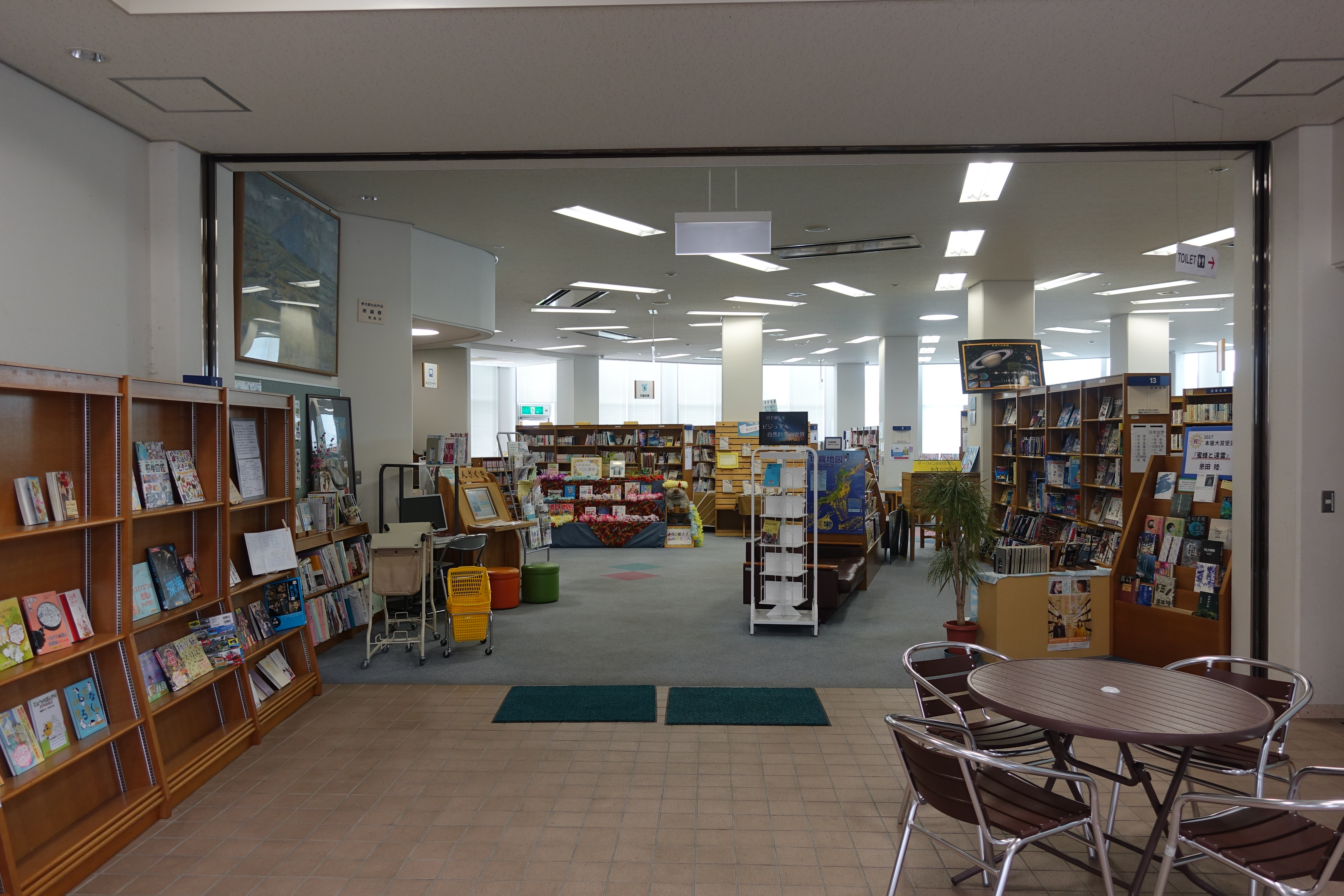 鹿児島県指宿市にある山川図書館の館内